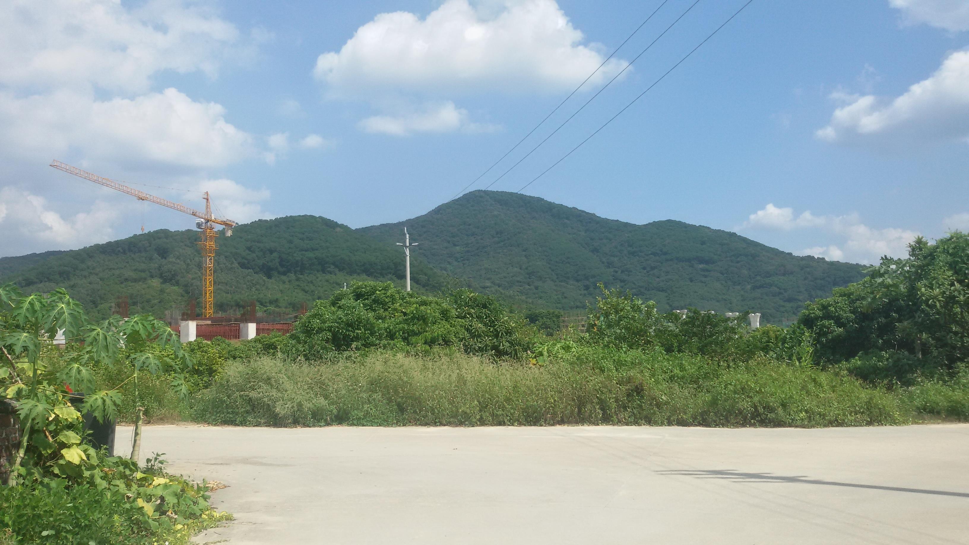 粵語: 楊大嶺